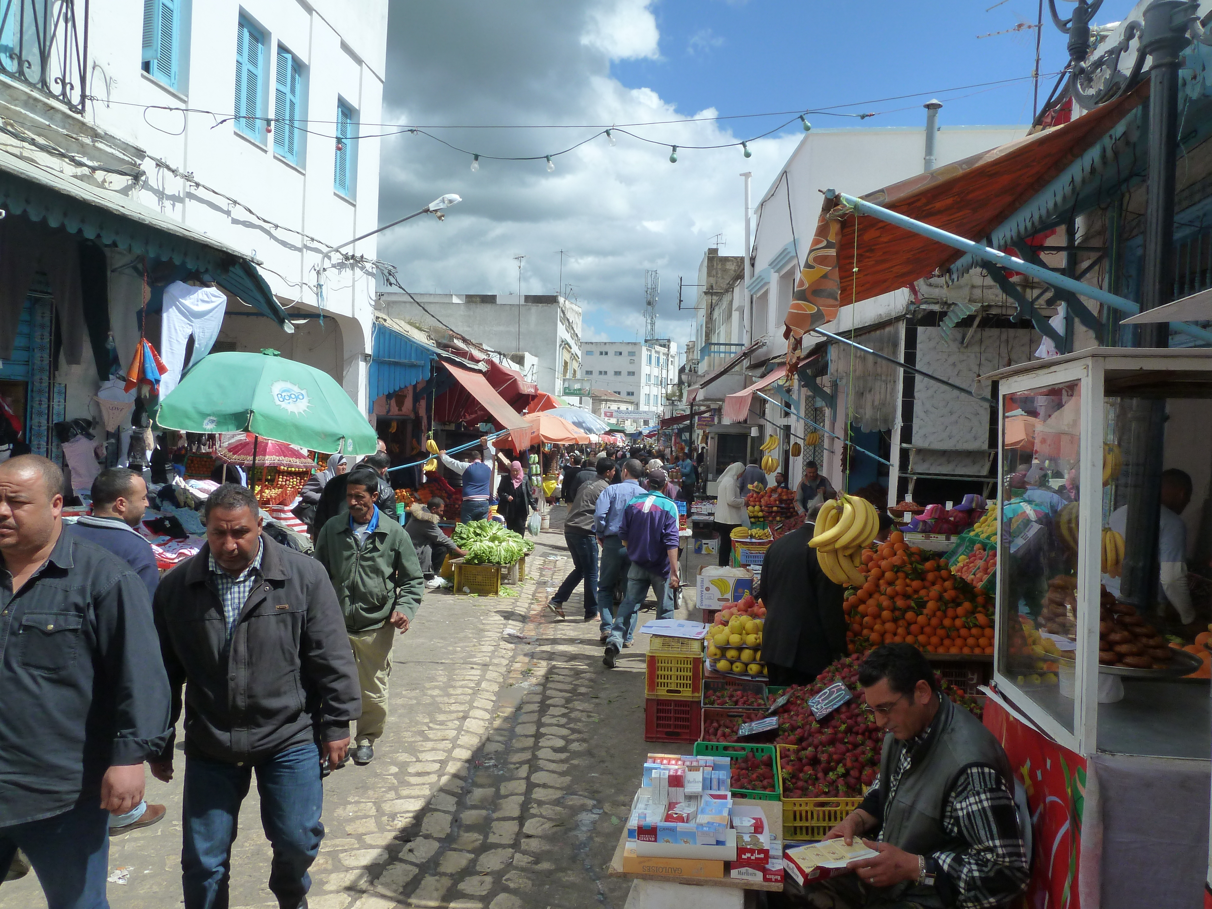 Le marché du centre ville de Béja.